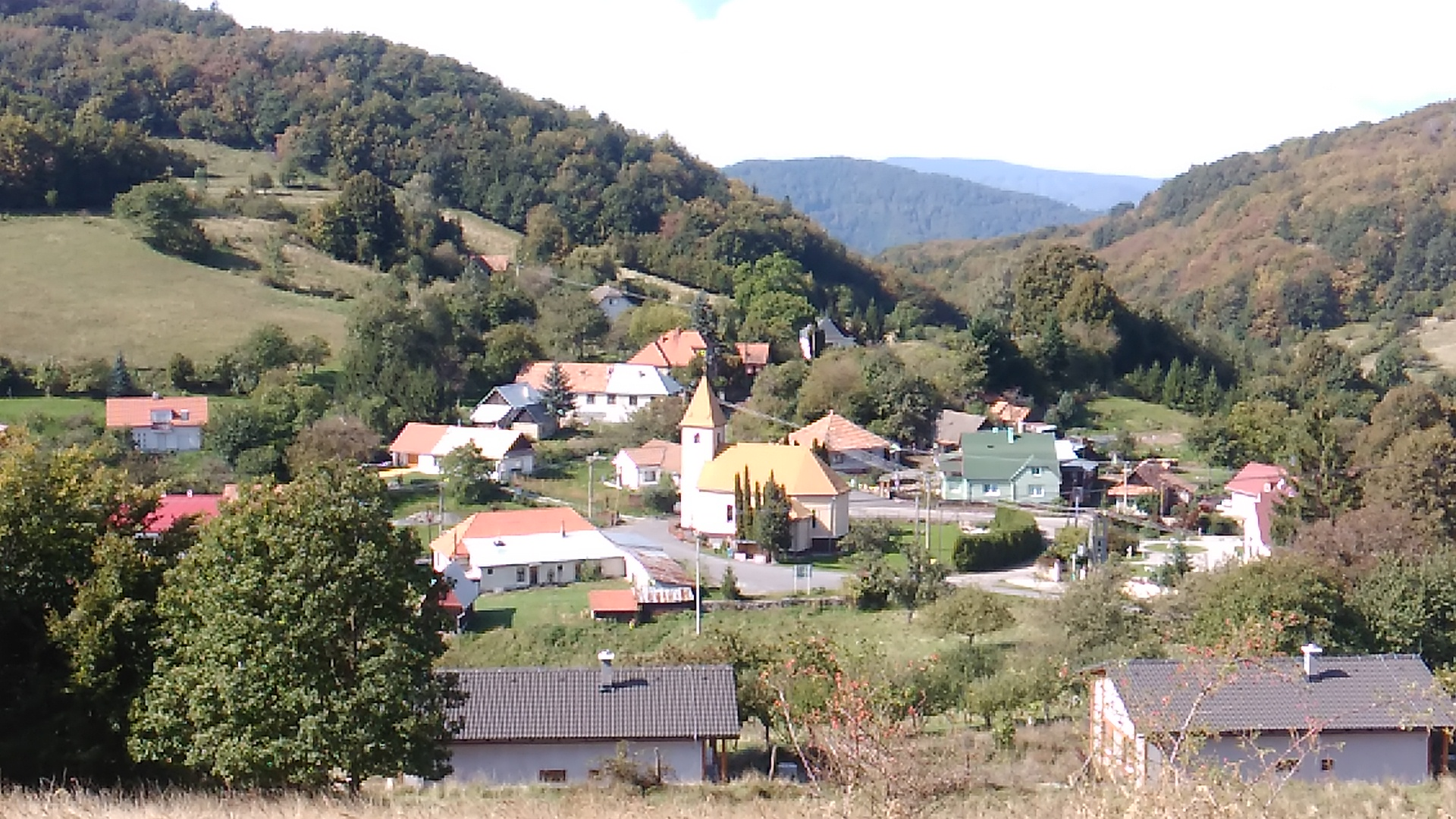 Bakaszenes látképe